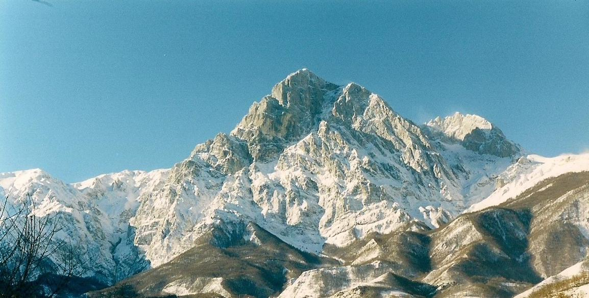 I due Corni in veste invernale dal versante teramano